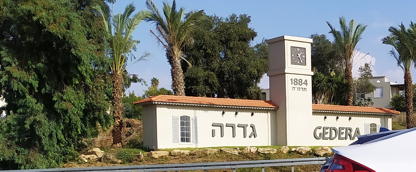 מגדל שעון במבואות גדרה